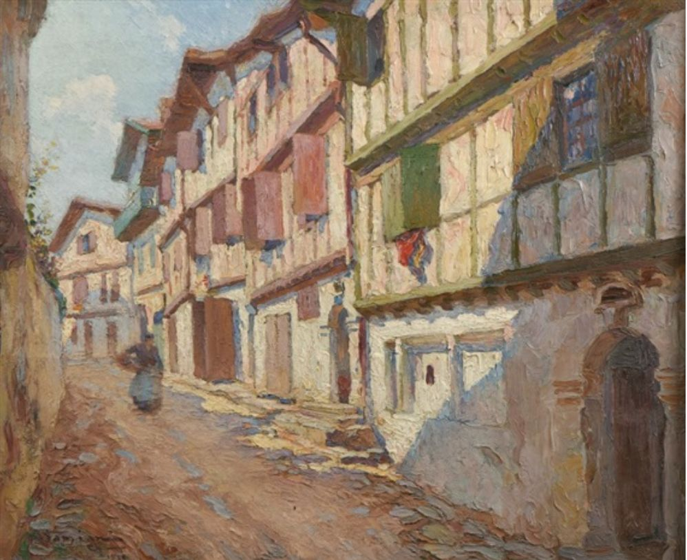 картины художника Шарля (Гарабед) Атамяна (1872—1947).